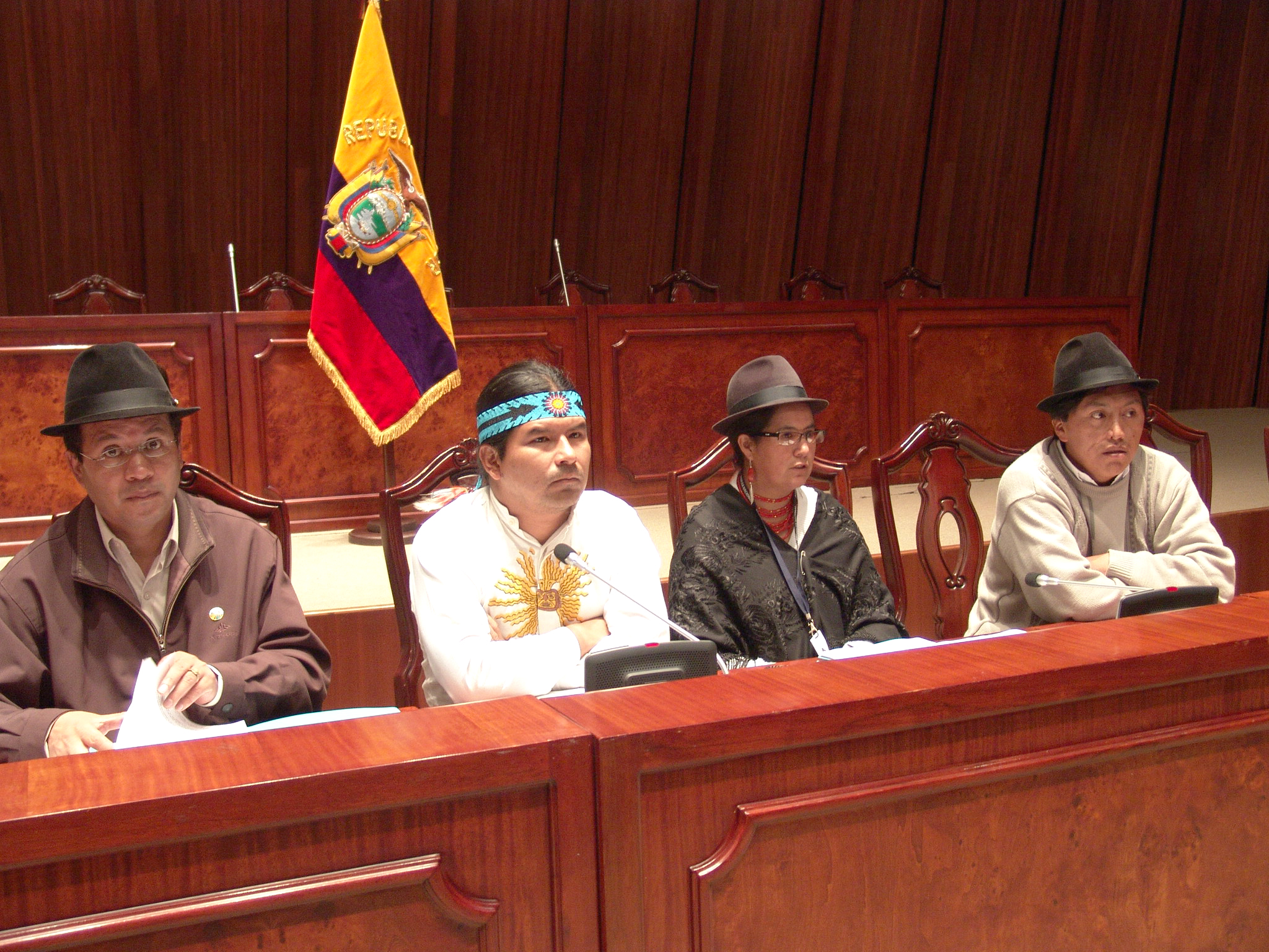 9 de noviembre de 2009